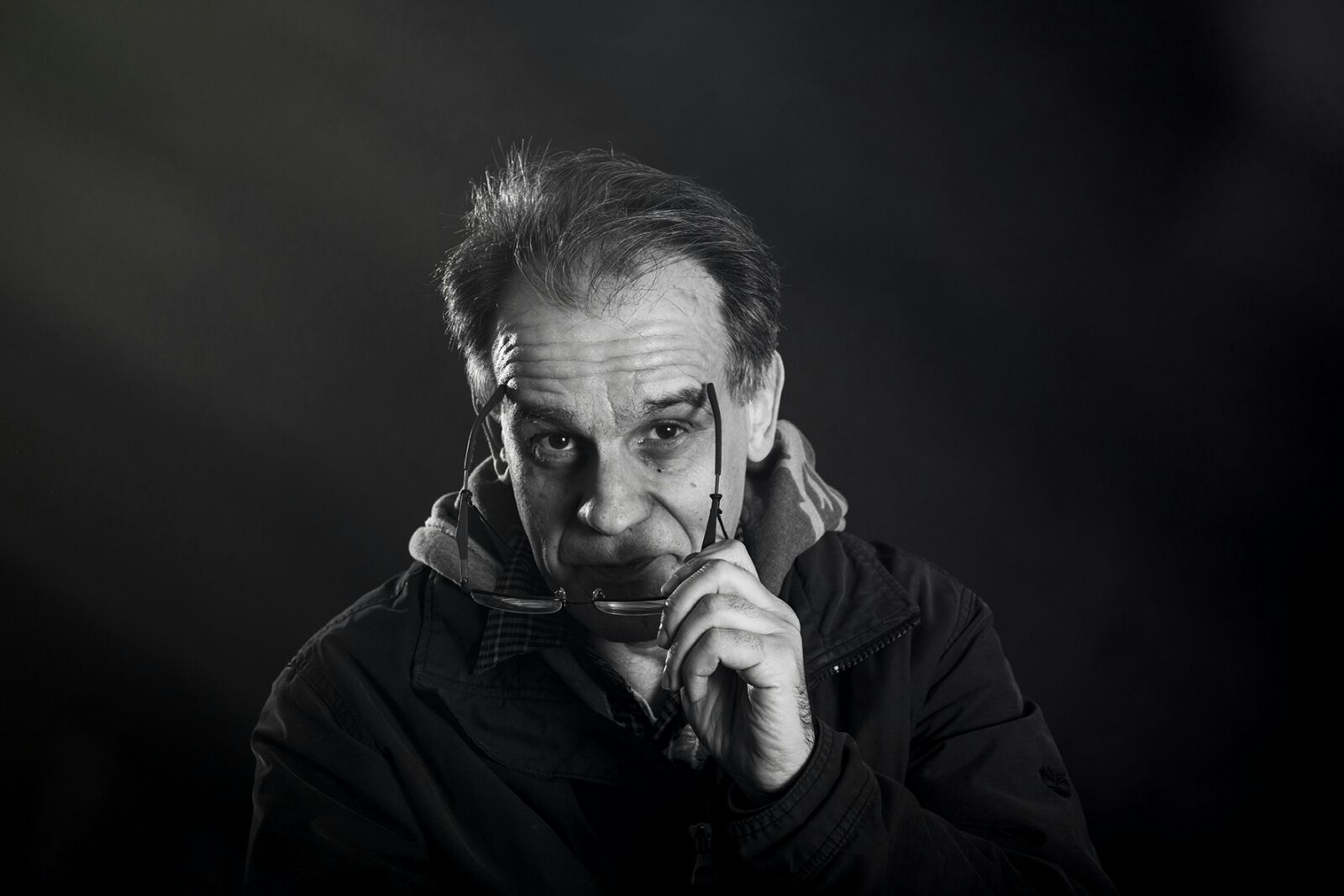 Manuel Veiga, escritor